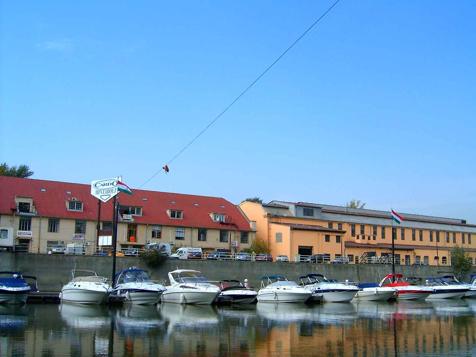 Hajók az Óbudai-szigeten, más néven Hajógyári sziget (Budapest, III. kerület)